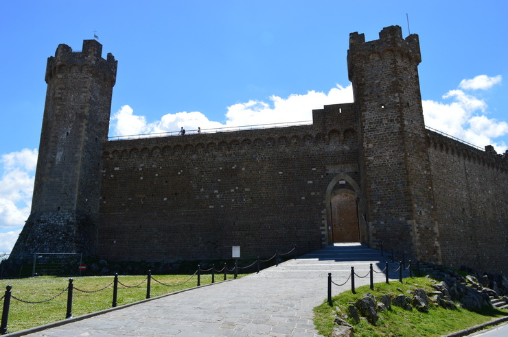 Крепость Монтальчино, май 2017 года